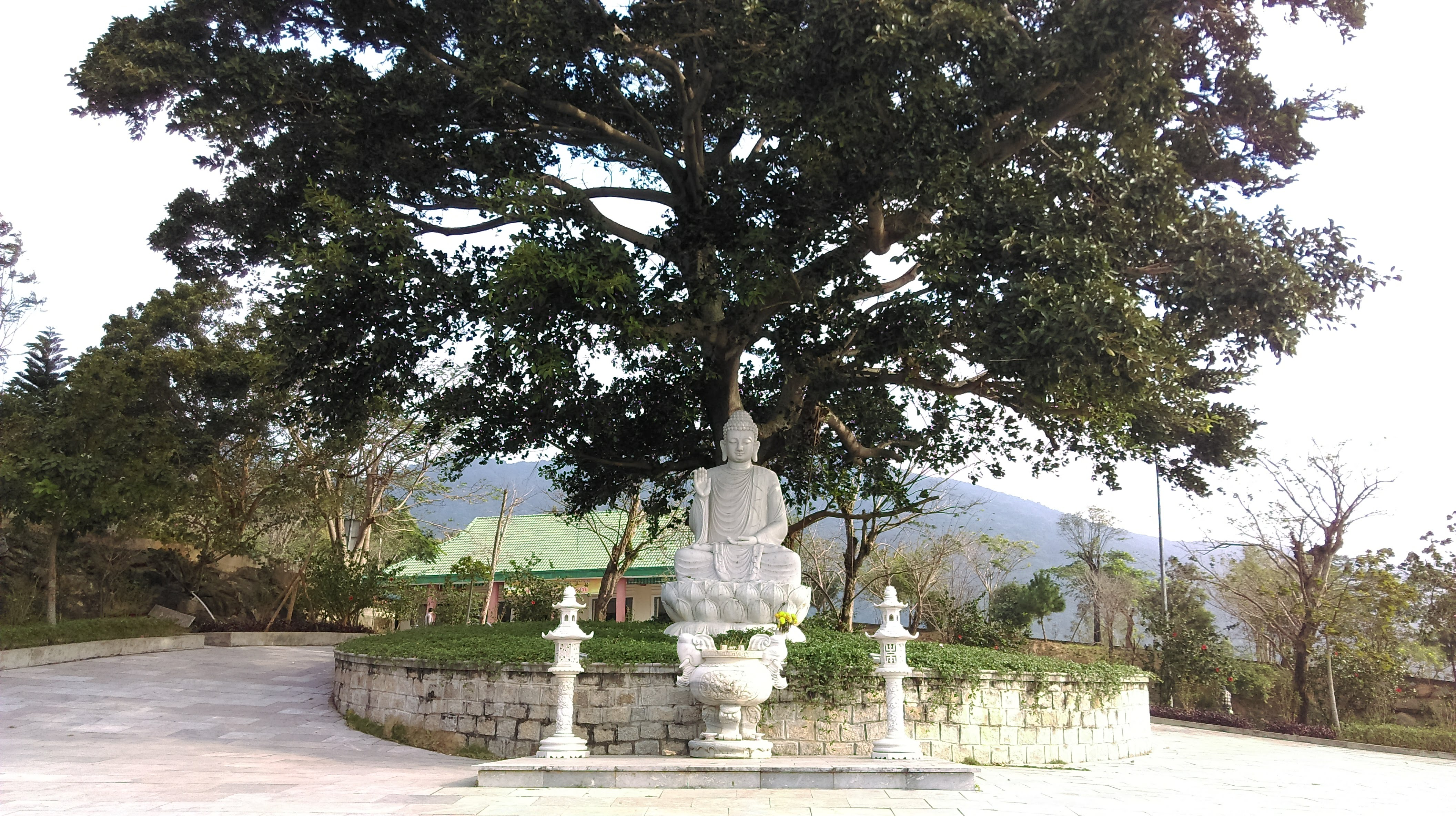 Vườn Lộc Uyển